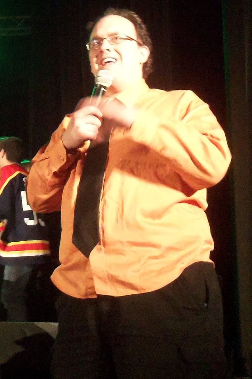 Martin Laporte, arbitre en chef au tournoi de l'Association franco-ontarienne des ligues d'improvisation étudiantes (AFOLIE), à Plantagenet, le 3 mai 2013.